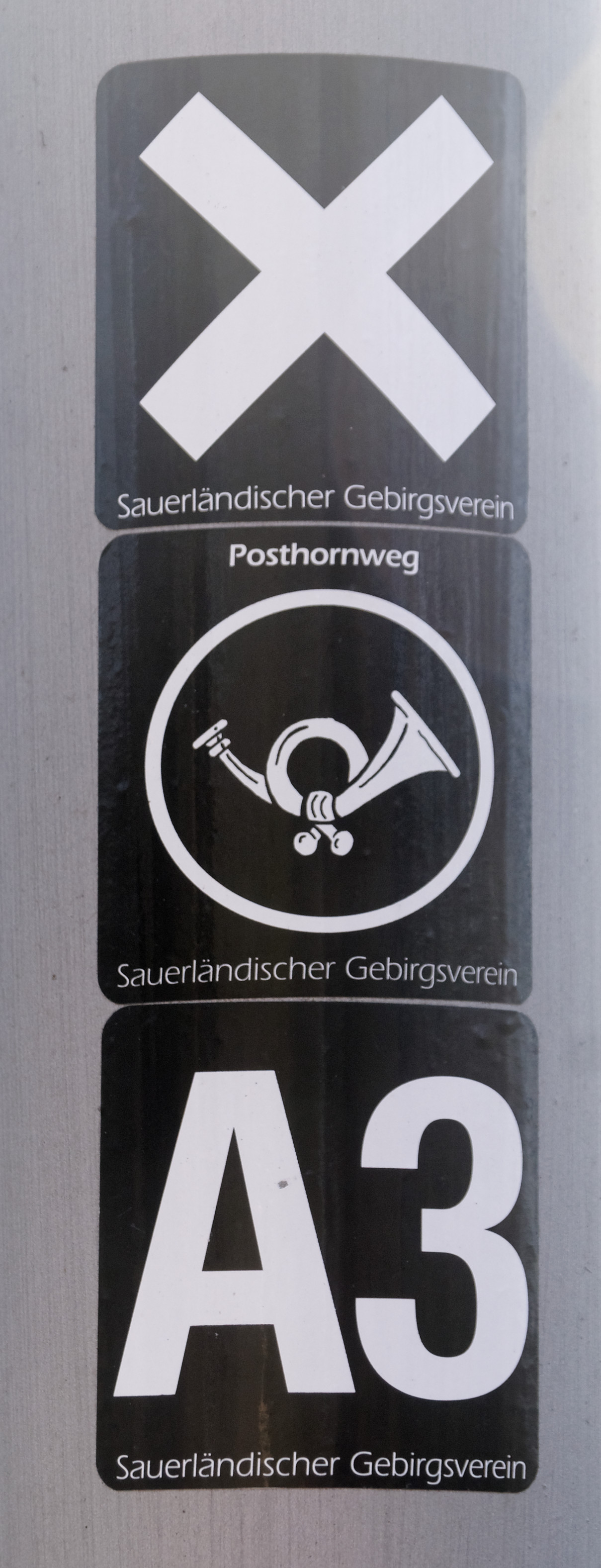 Beschilderungen des Sauerländischen Gebirgsvereins im Rheinland